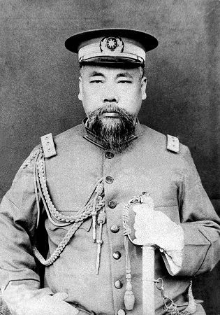 程德全